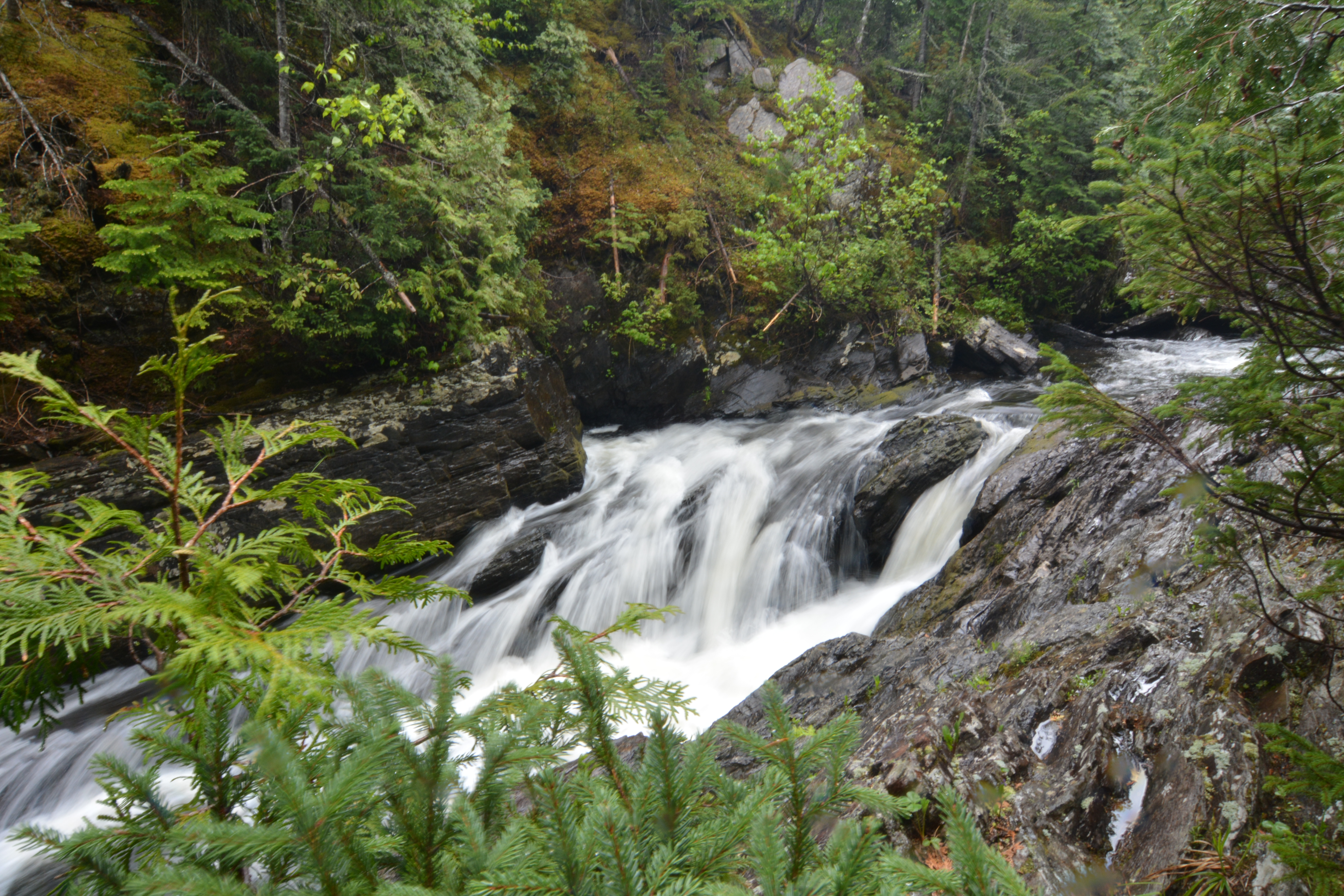 Petites chutes sur la rivière Blanche Sud au site de la grotte des fées à Saint-Léandre